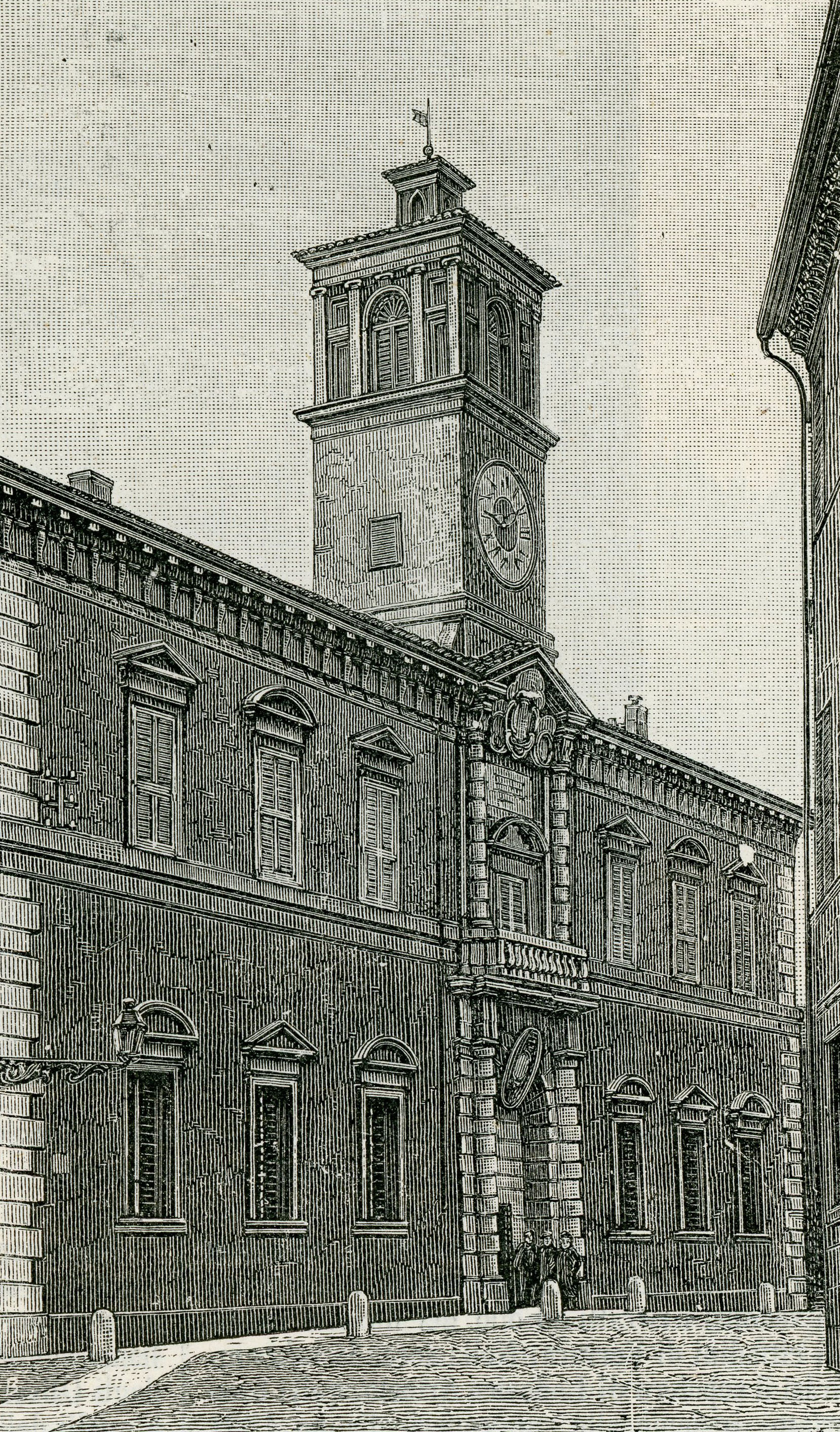 Ferrara: Palazzo dell’Università, (xilografia di B.).